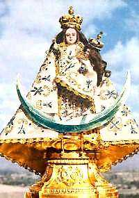 Esta imagen es la más antigua del Continente Americano, hecha en el siglo XVI por un desconocido artesano español, es de madera estofada y mide 27 cm. De alto se le pone sobre n vestidos Coronas y una luna bajo sus pies